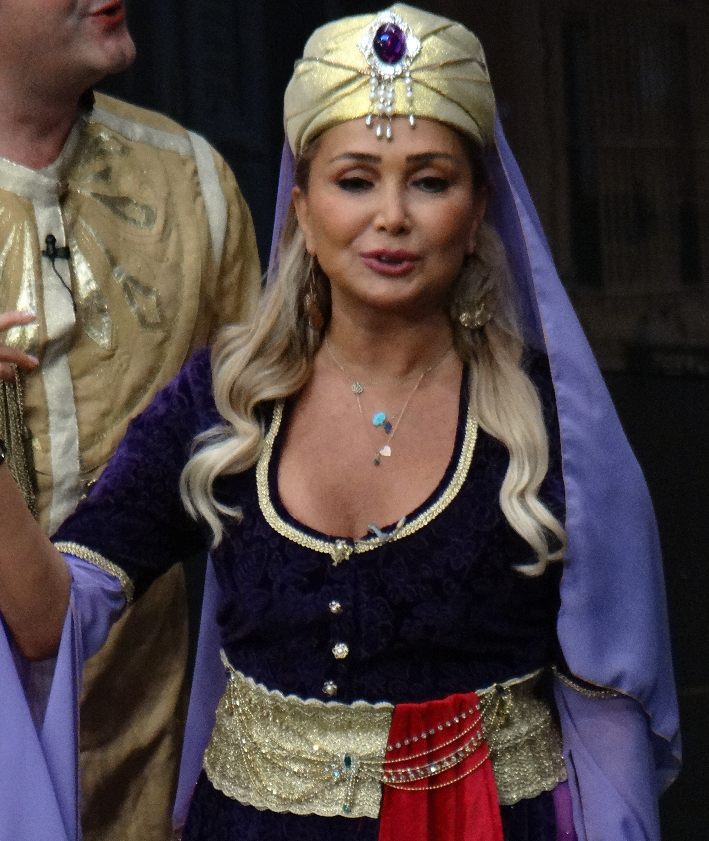 Yonca Evcimik at 7 Kocalı Hürmüz